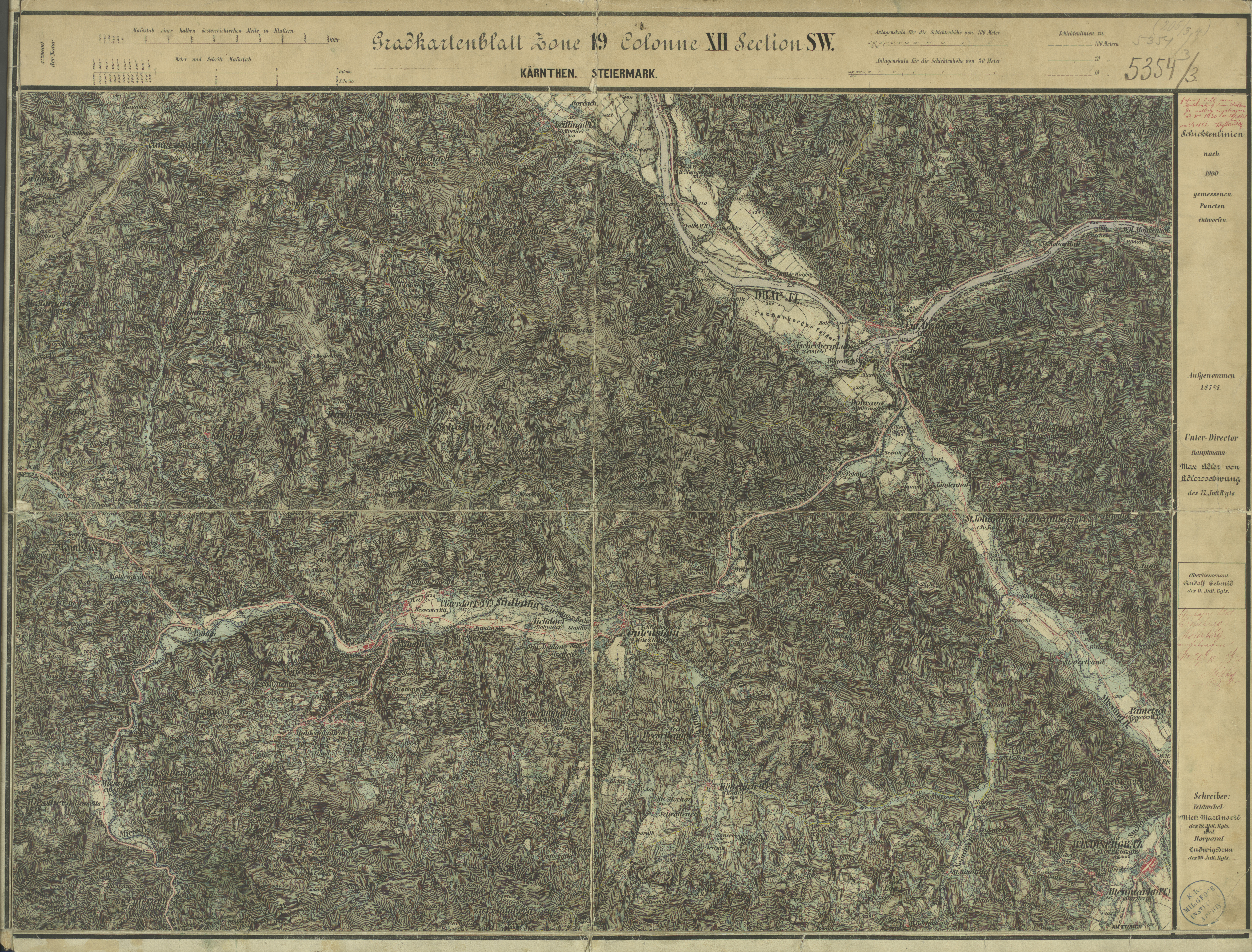 historische Landkarte: Gradkartenblatt Zone 19 Colonne XII Section SW (später 5354/3). Franzisco-josephinische (3.) Landesaufnahme der österreichisch-ungarischen Monarchie. Aufnahmeblatt 1:25.000. Aufgenommen 1878, Unterdrauburg, unteres Mießtal